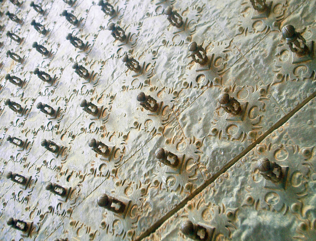 Detall de la porta de l'església de l'Assumpció de Calaceit (Matarranya)